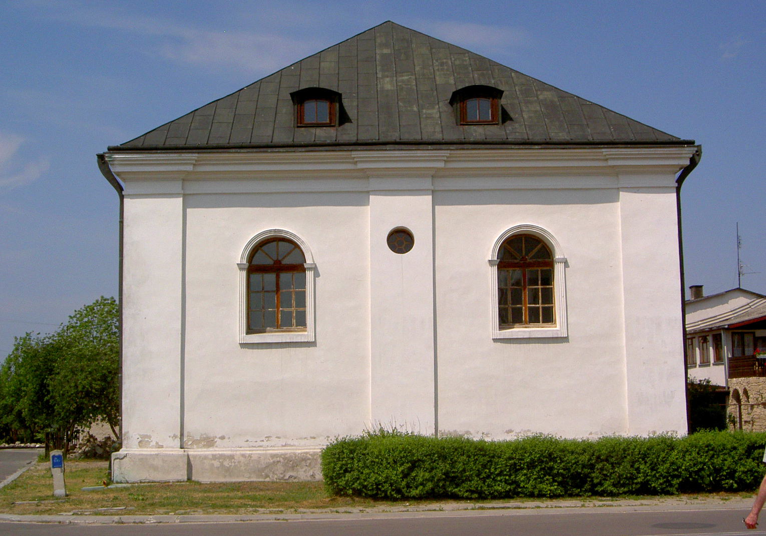 Józefów Biłgorajski, Poland • Dawna synagoga / Former synagogue